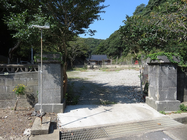 旧・峰町立櫛小学校跡地